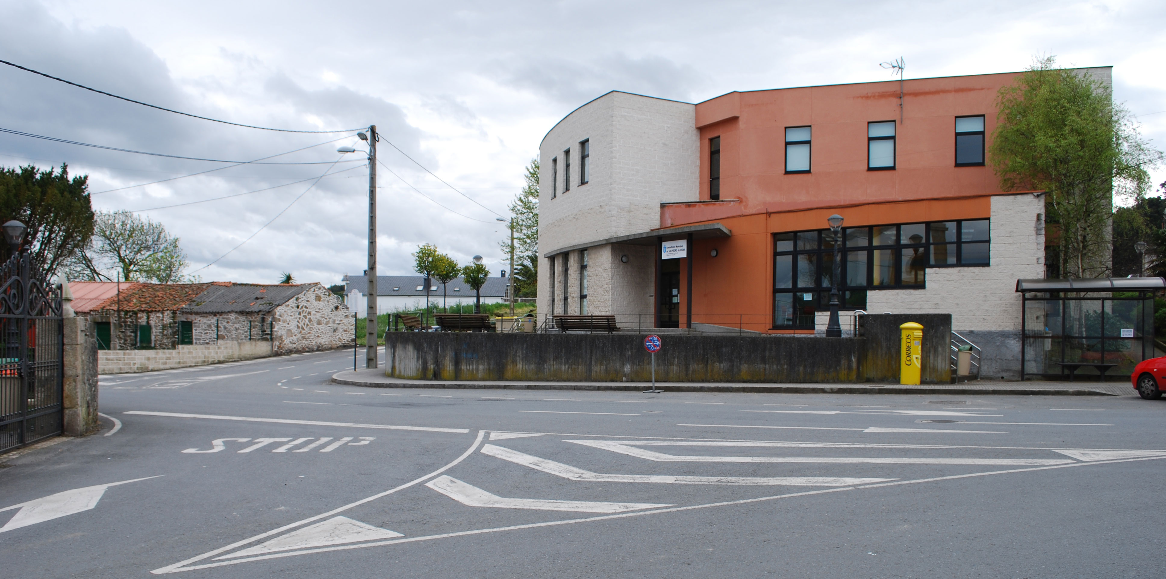 Local social de San Pedro de Visma, A Coruña Galiza Spain